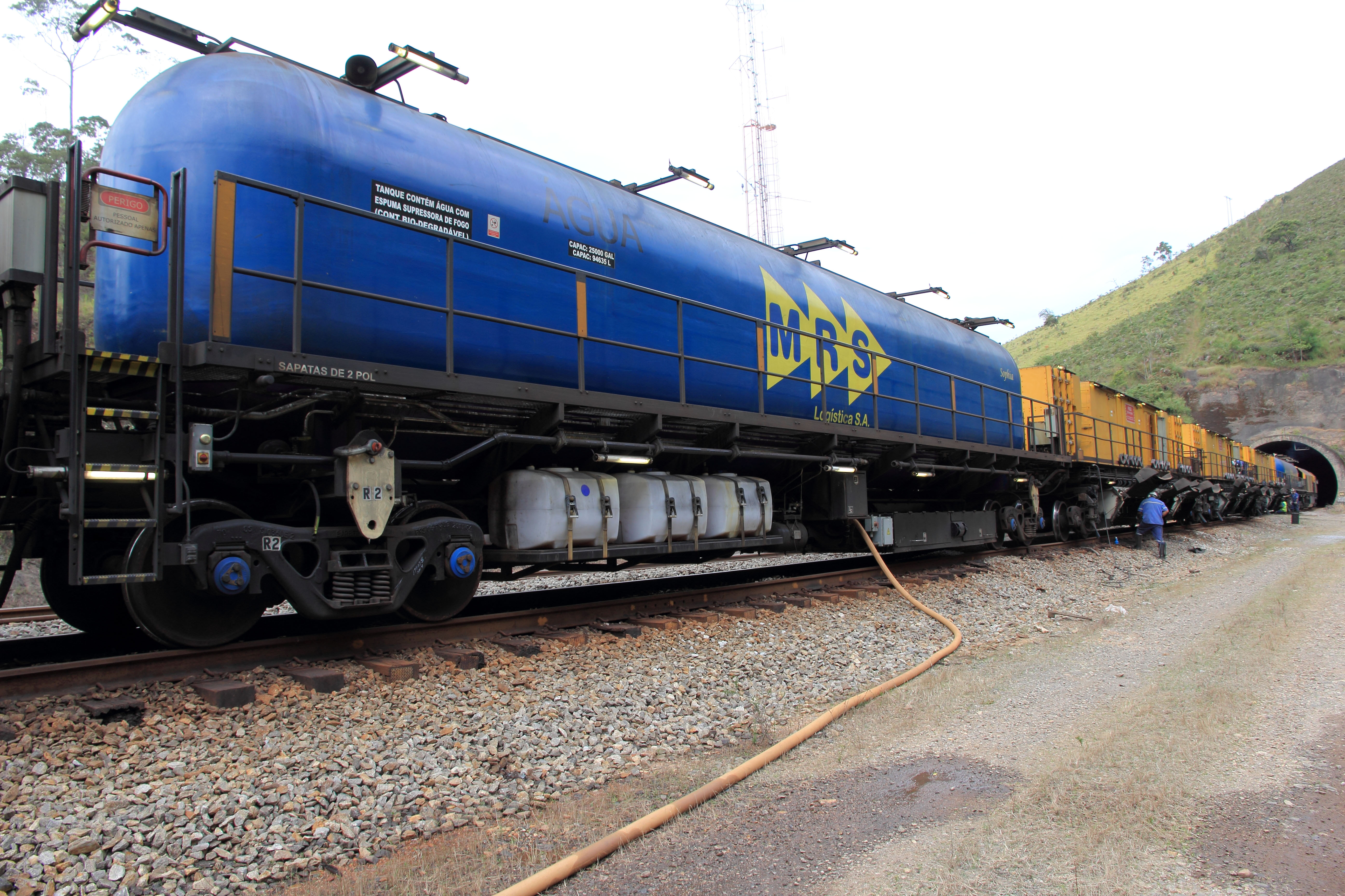 Manutenção do trem esmerilhador